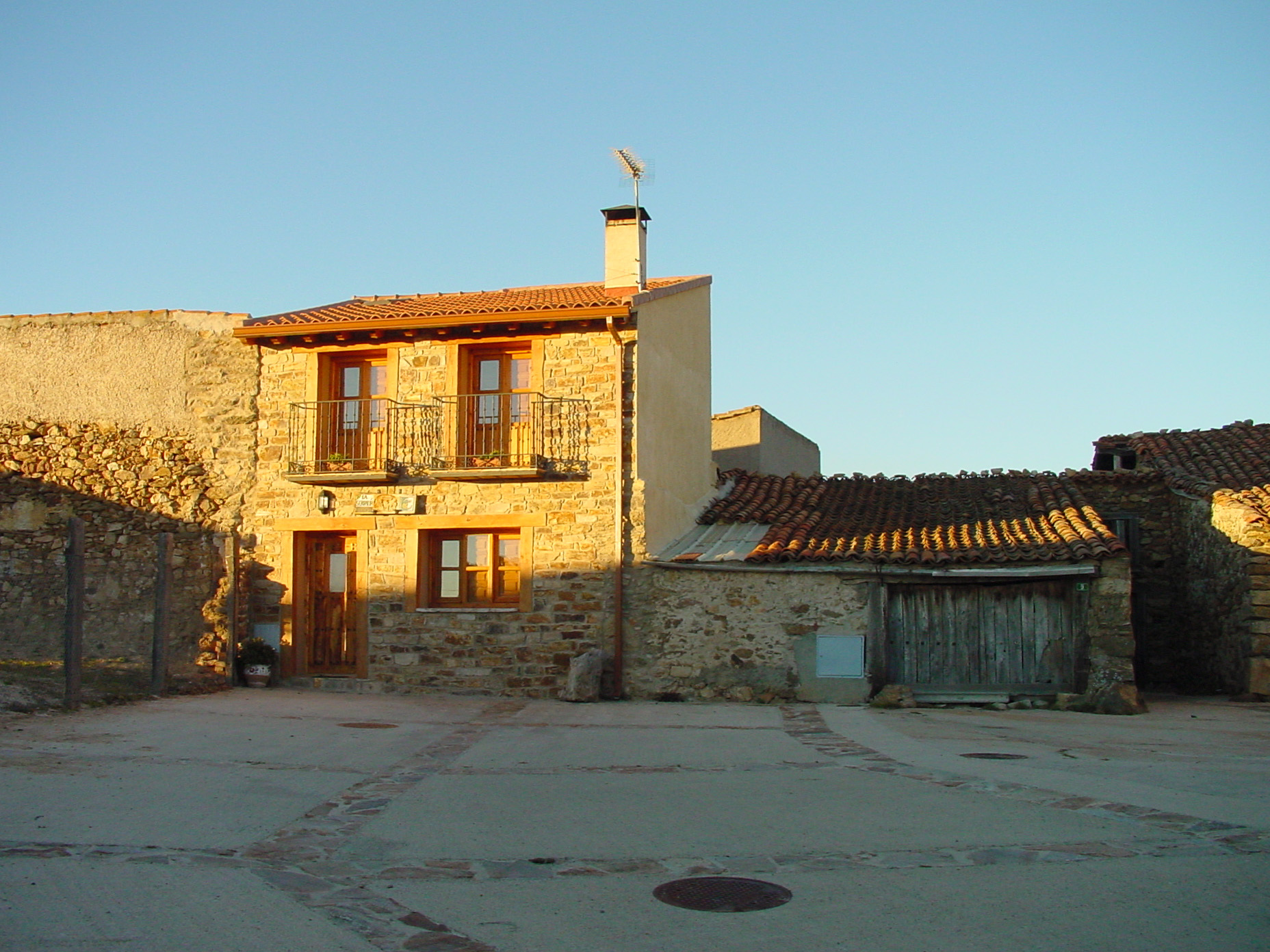 Casa de piedra en La Serna del Monte.